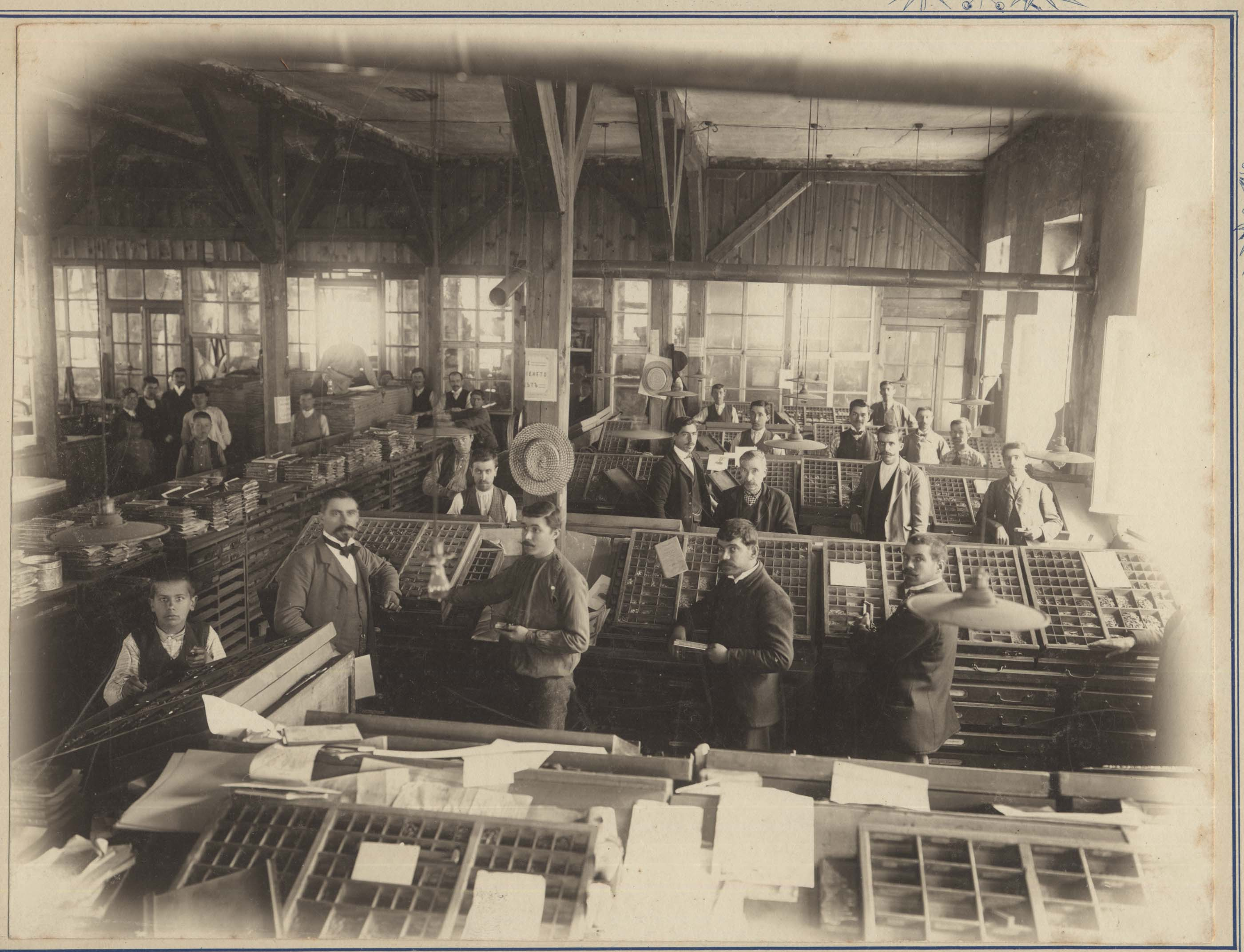 Печатницата на Христо Г. Данов (Пловдив, 1905)